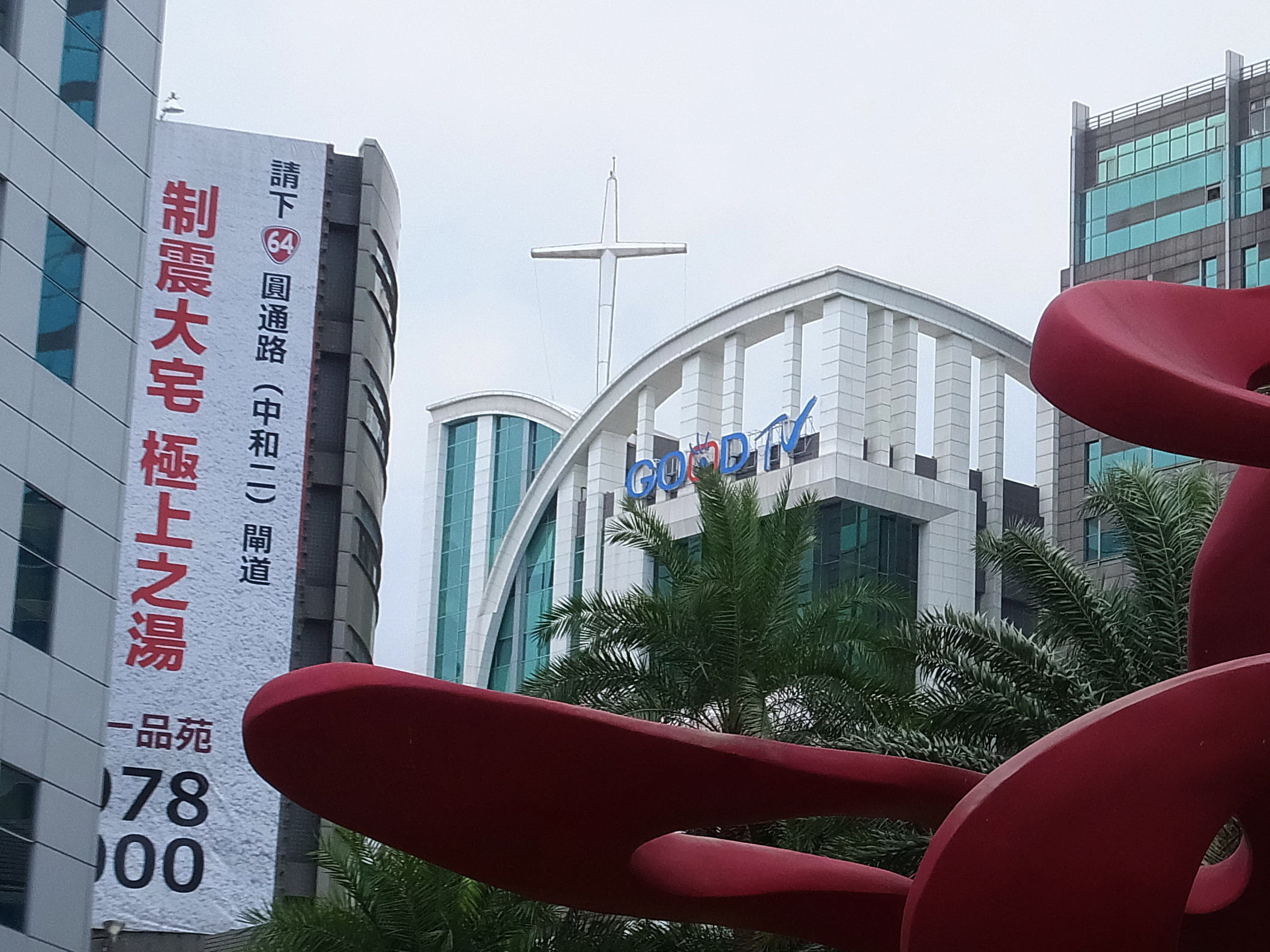 好消息衛星電視台媒體宣教大樓。